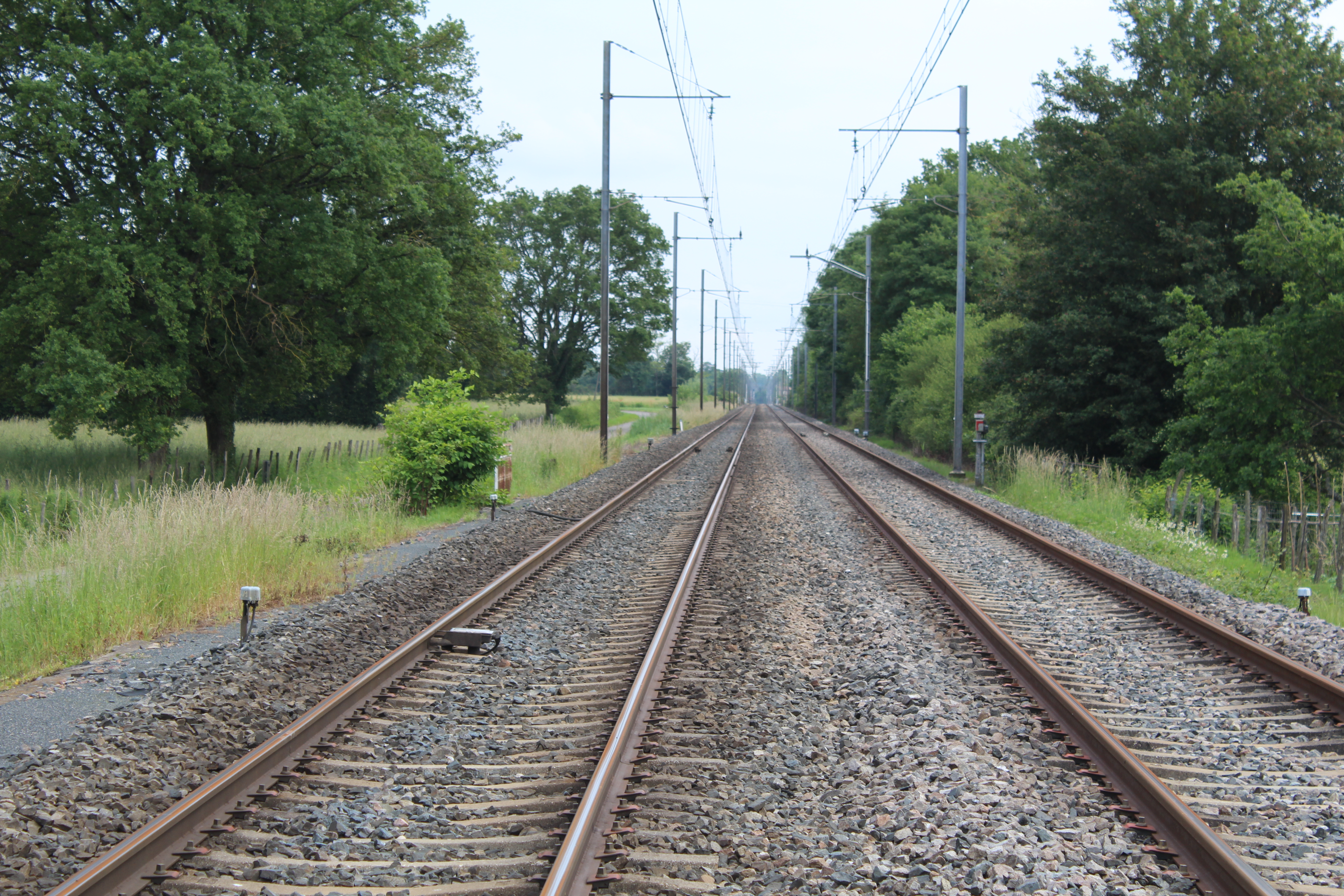 Passage à niveau à Corsant, hameau de Perrex.